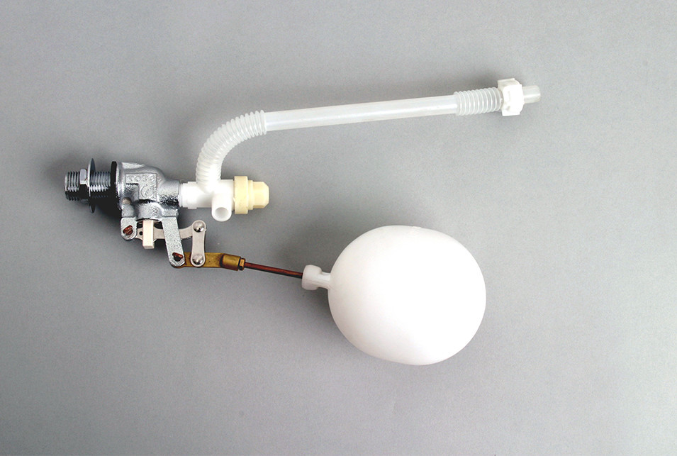 TOTOボールタップ